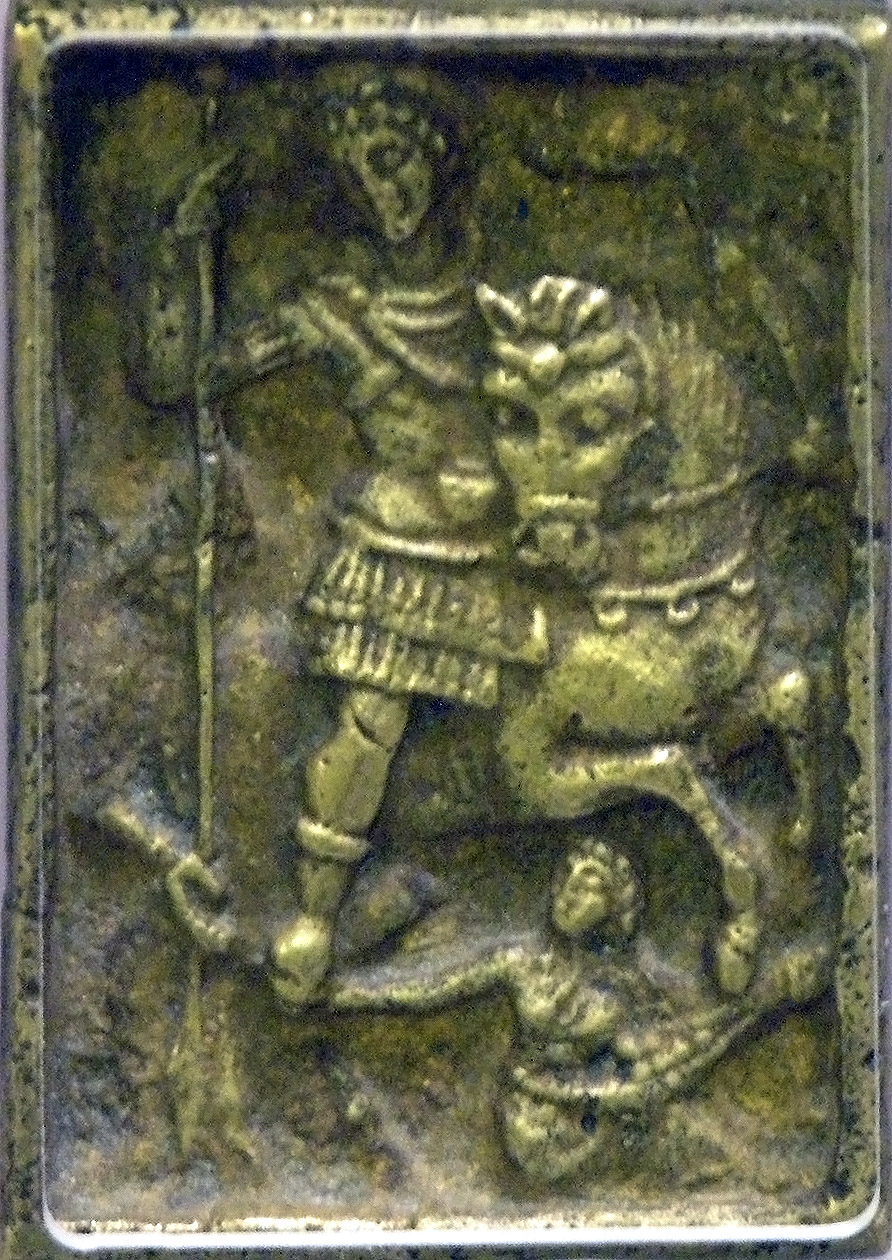 Poids en laiton portant une représentation d'un empereur monté triomphant. Image imitant le célèbre ivoire Barberini.